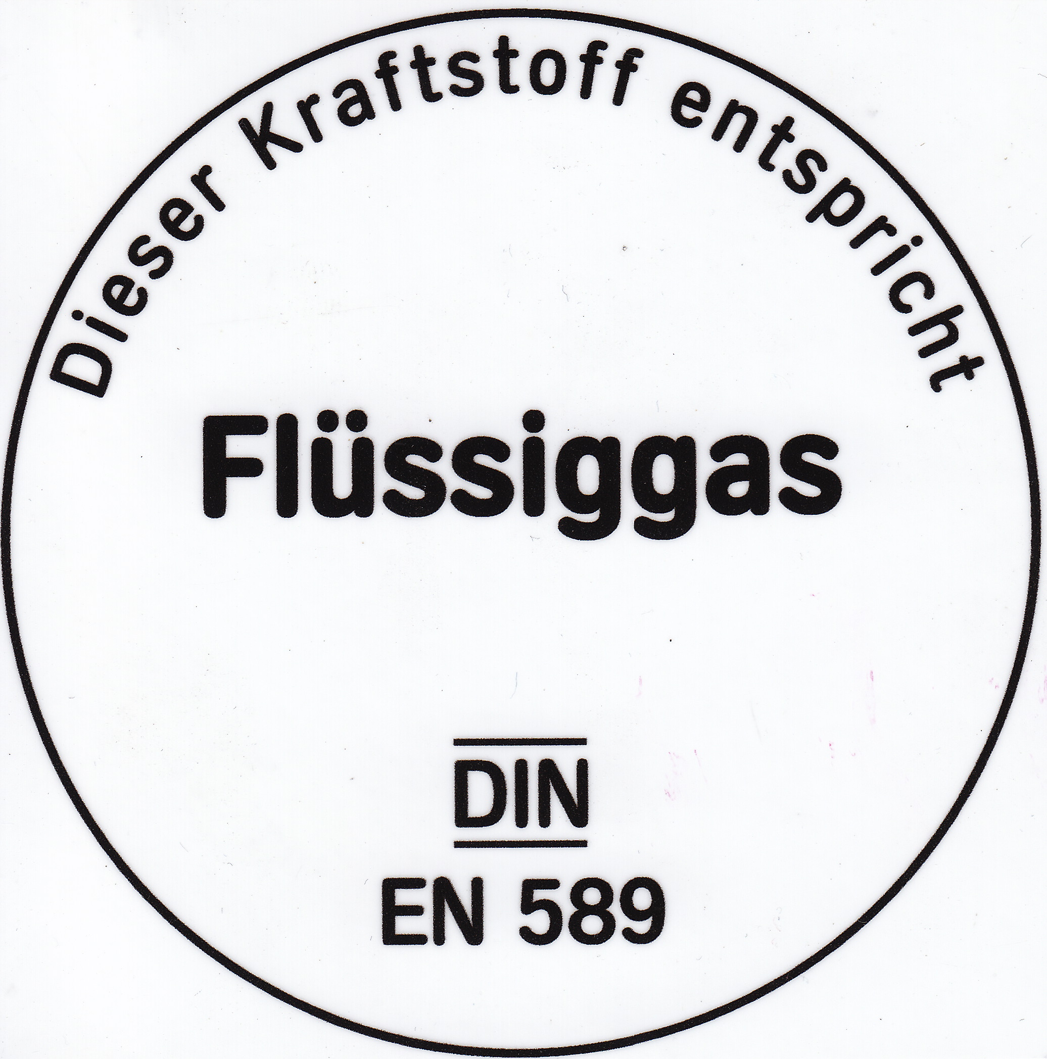 Flüssiggas DIN EN 589 Zapfsäulenaufkleber nach § 13 der Zehnten Verordnung zur Durchführung des Bundes-Immissionsschutzgesetzes (10. BImSchV)